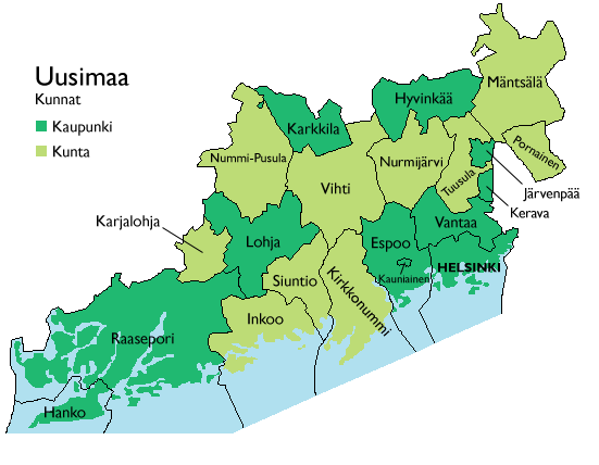 Kartta Uudenmaan kunnista.